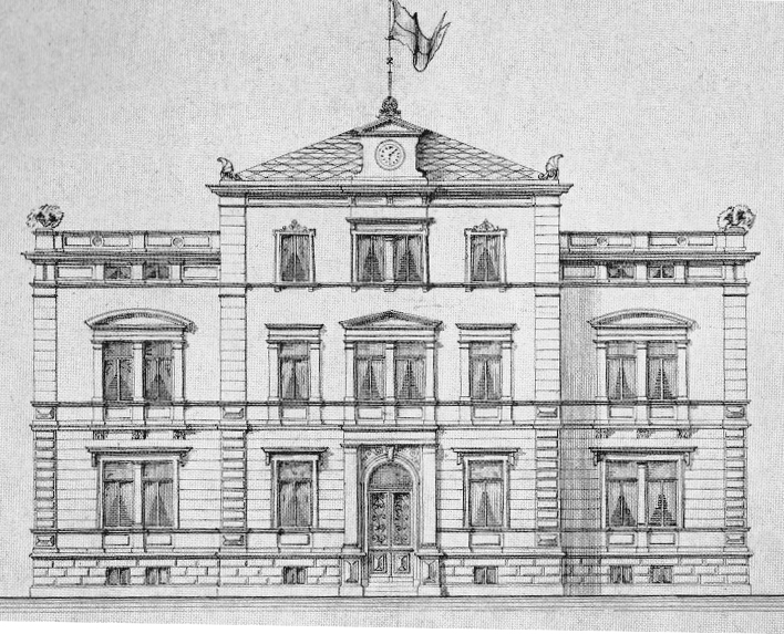 Aufrisszeichnung des Paul-Marien-Stfts